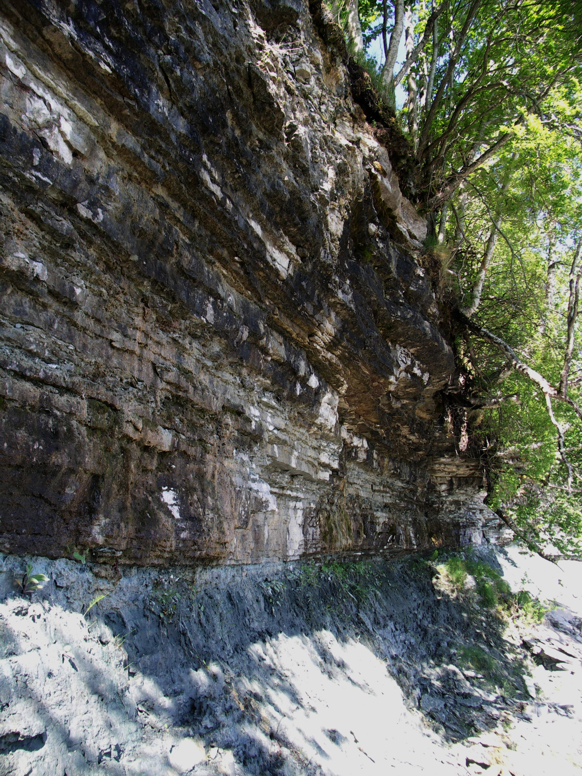 Leetse pank on pank Põhja-Eesti klindi Lääne-Harju klindilõigus Pakri poolsaarel